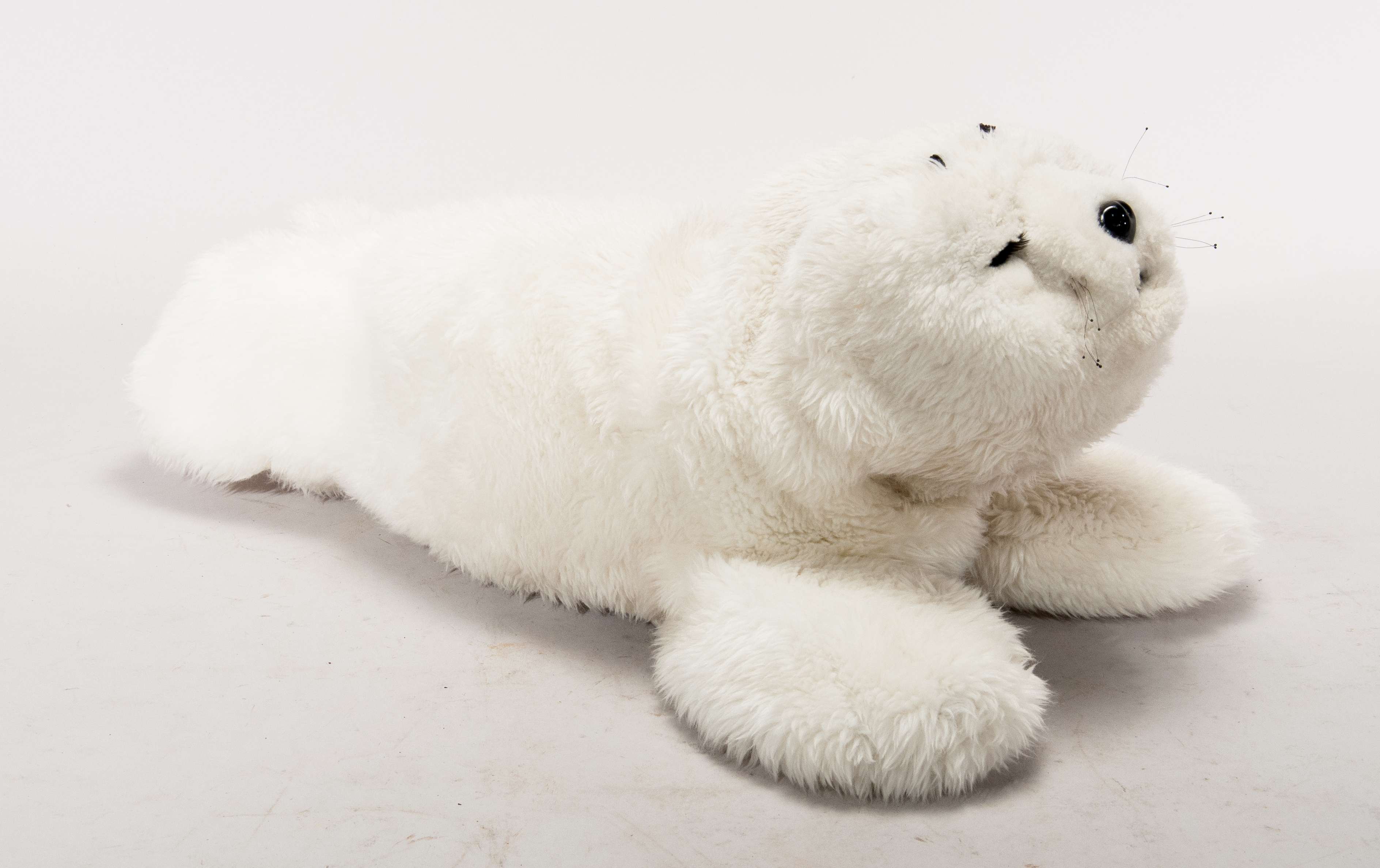 Terapeutisk robotsäl "Paro", i hölje av vitt teddytyg. Innehåller sensorer, elektronik och servomotorer för att kunna reagera på beröring. Laddning sker genom munnen, kontakten är maskerad som napp. Knapp för start finns mellan de bakre fenorna.